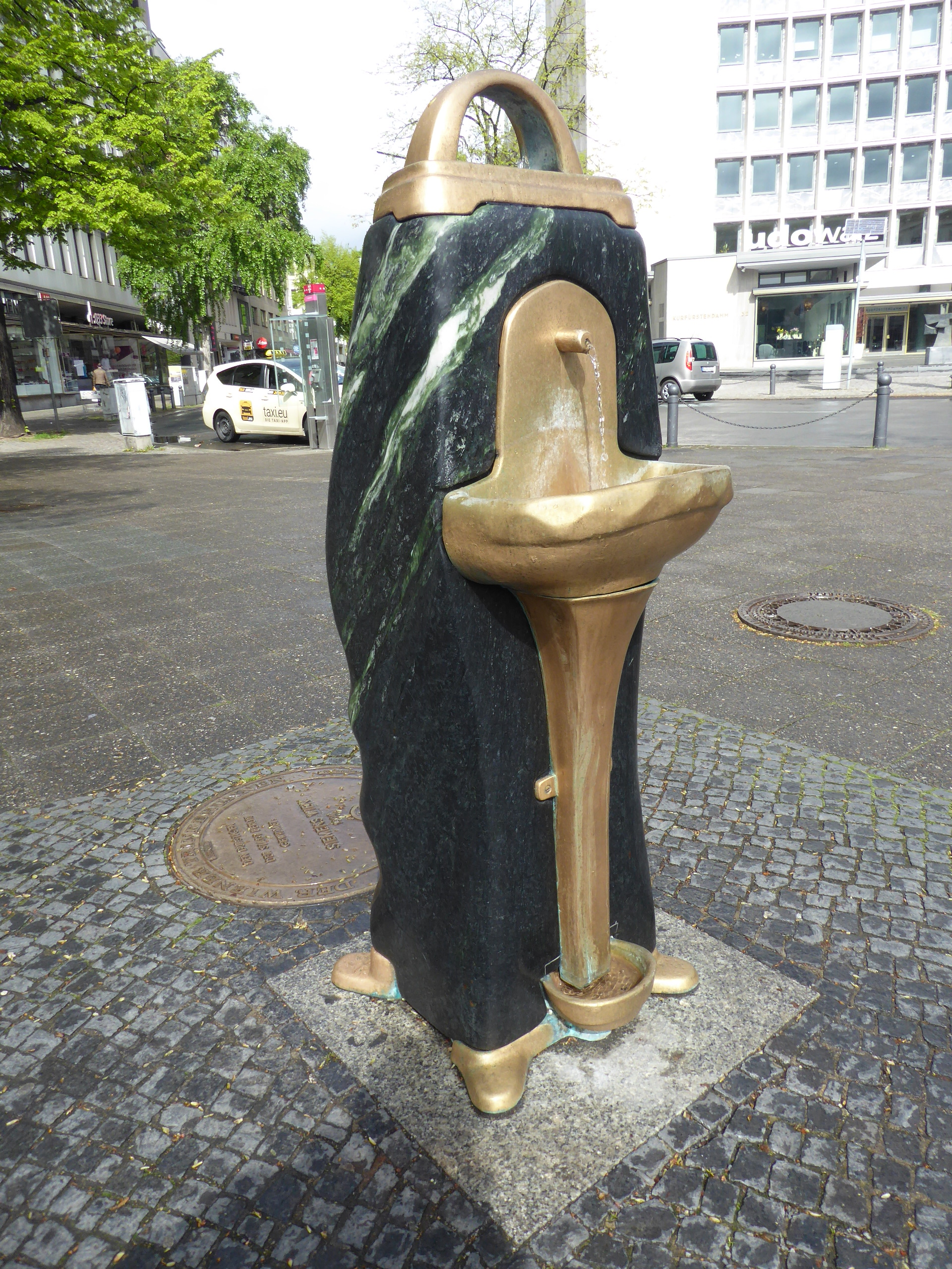 Charlottenburg Kurfürstendamm 33 Wiener Trinkbrunnen